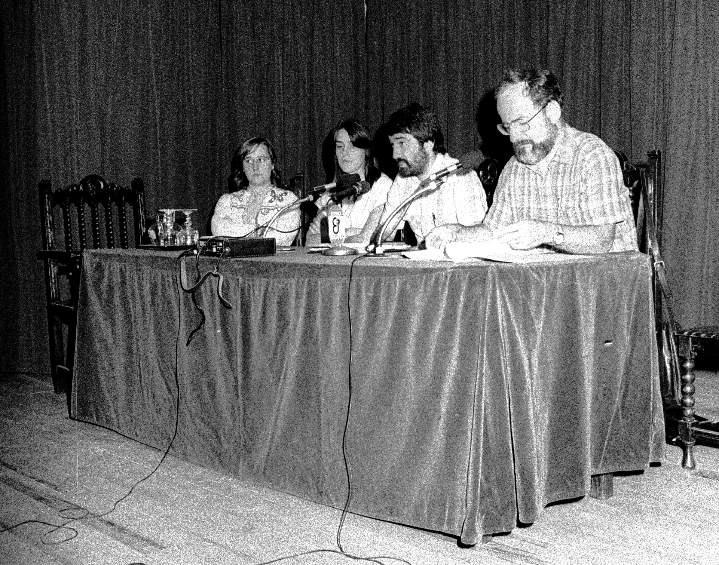 Klaudio Harluxet 1984ko UEUko irekiera-hitzaldian